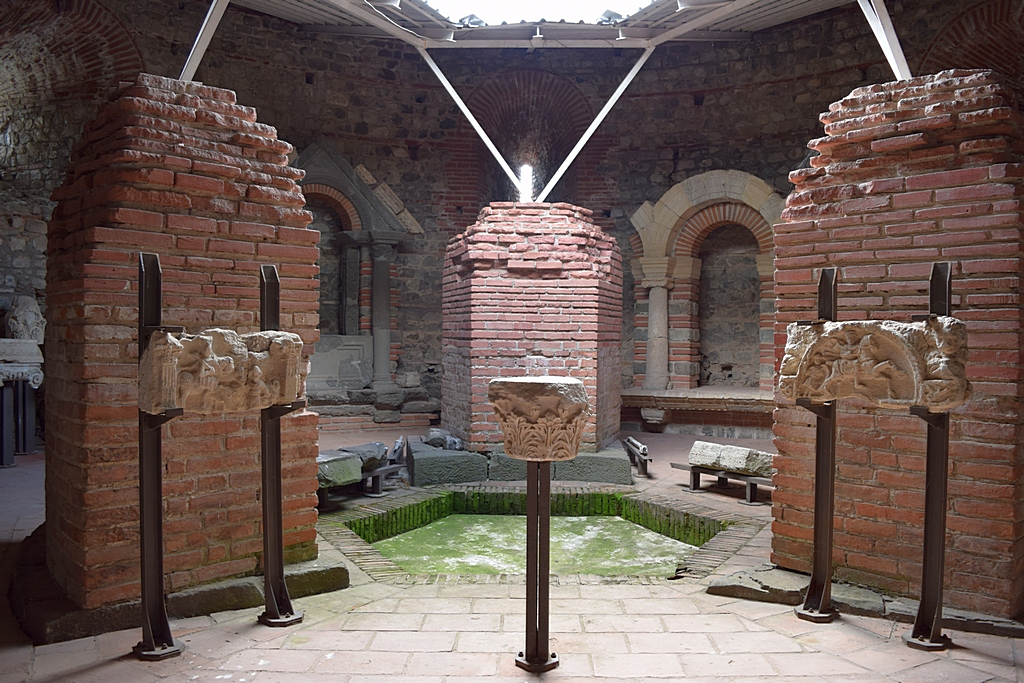 Природни простор око непокретног културног добра Гамзиград